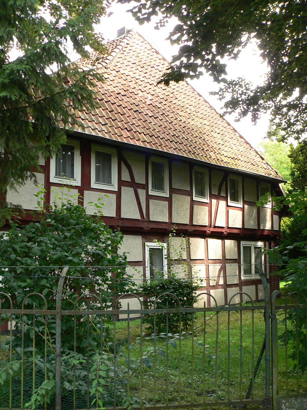 Hof Burzlaff, rückwärtiger Giebel des Hallenhauses